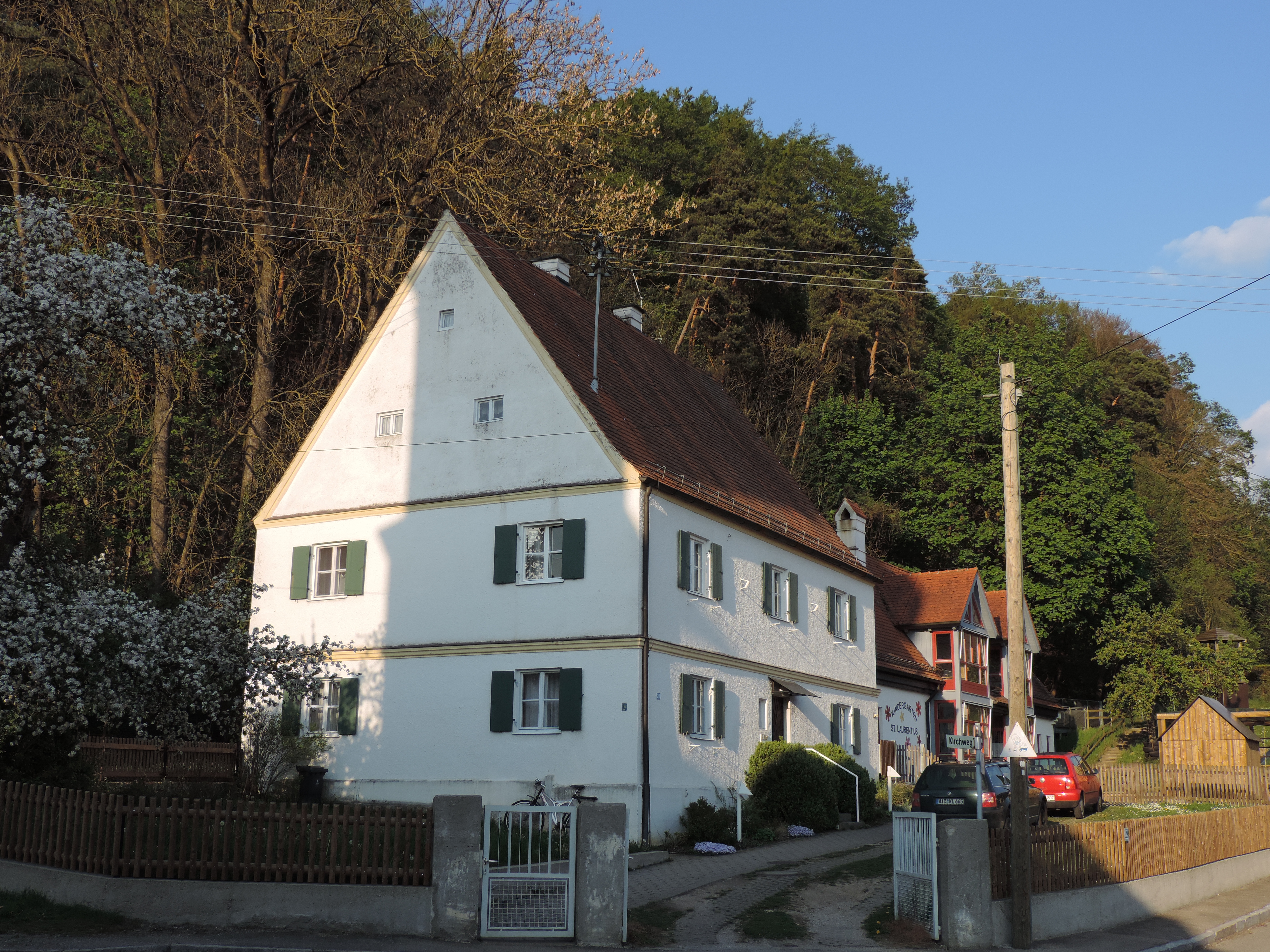 Pfarrhaus Oberbaar, zweigeschossiger Satteldachbau mit Gesimsgliederung, 1692